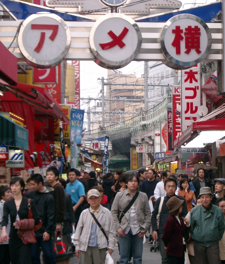 位于日本東京都台东区上野著名的商店街 - AMEYOKO taken by myself.03.11.2005